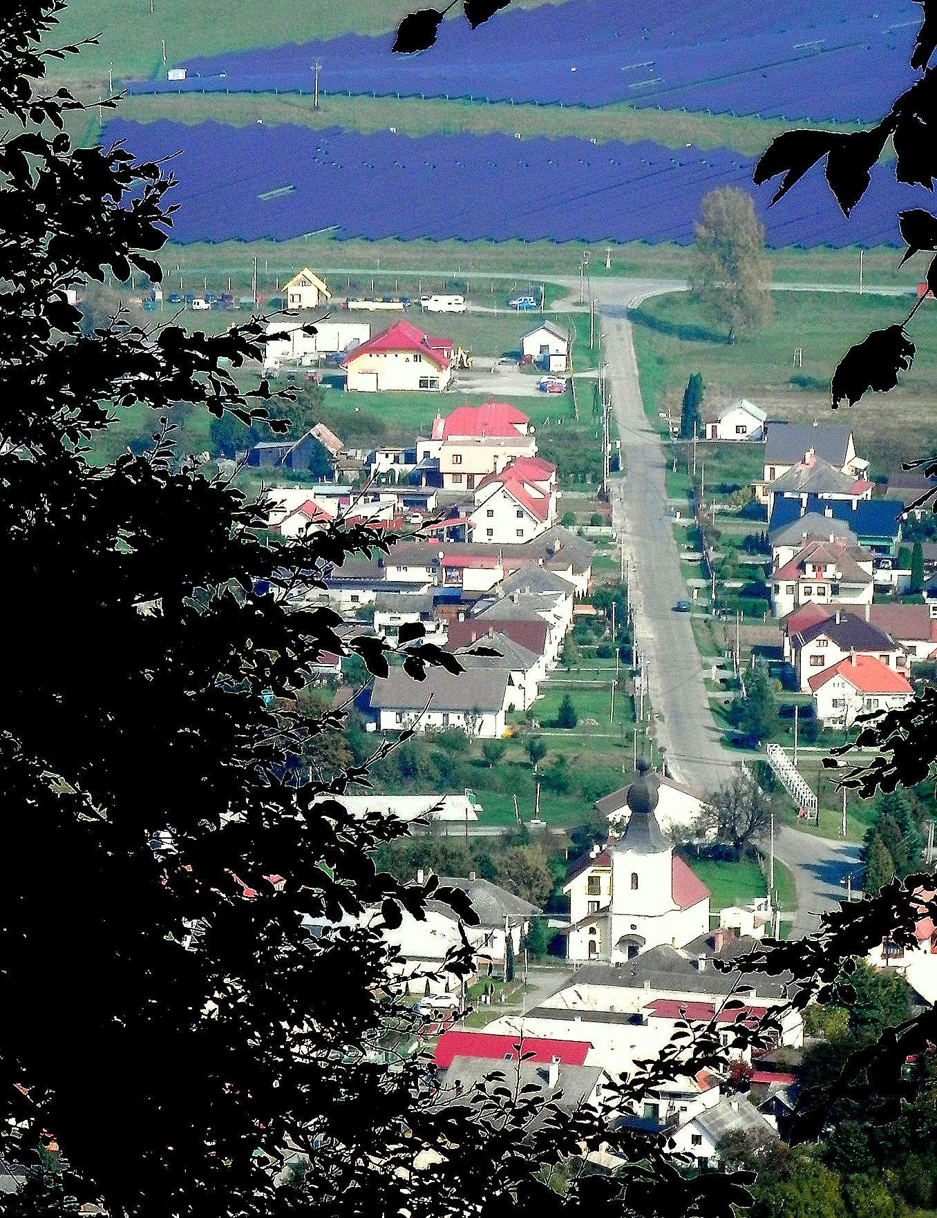 Výhľad z Kapušianskeho hradu na obec Fulianka.